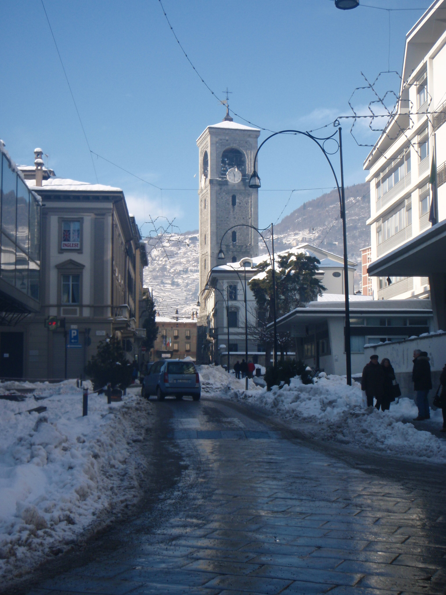 Via Piazzi Sondrio